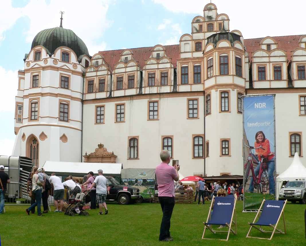 Schloss Celle beim Landpartiefest